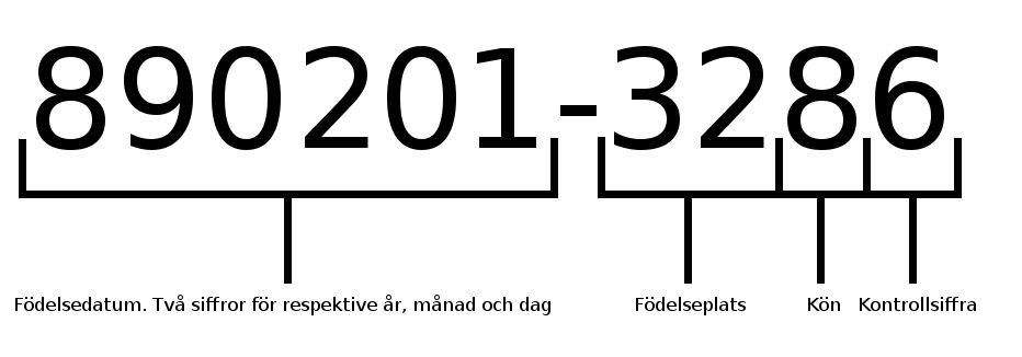 Ett påhittat svenskt personnummer